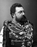 Ferdinand Philipp von Sachsen-Coburg und Gotha (* 28. März 1844; † 4. Juli 1921) Fernando Filipe de Saxe-Coburgo-Gota (1844-1921)